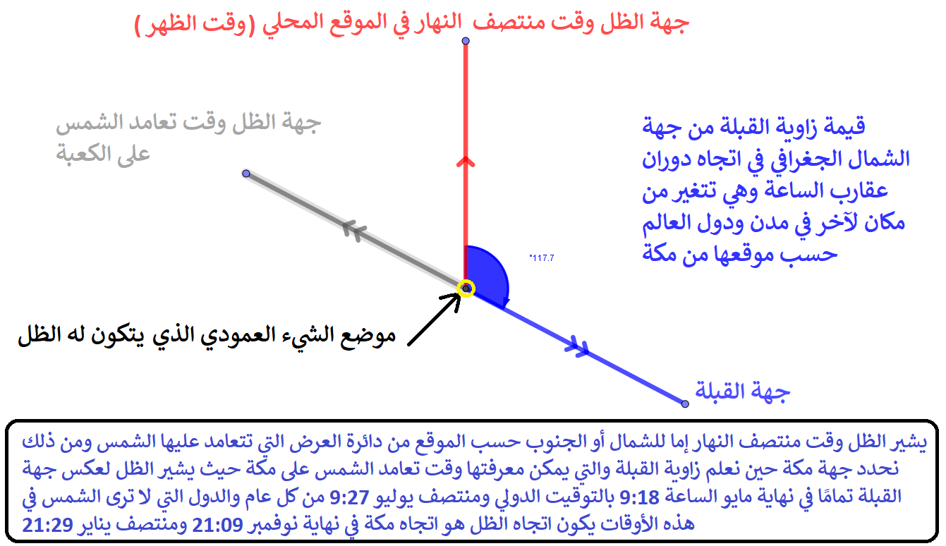 رسم توضيحي لجهة الظل في وقت تعامد الشمس على مكة وجهة القبلة على نفس الاستقامة ويوضح زاوية القبلة مع خط الزوال سواء الشمال أو الجنوب حسب الموقع من موقع تعامد الشمس